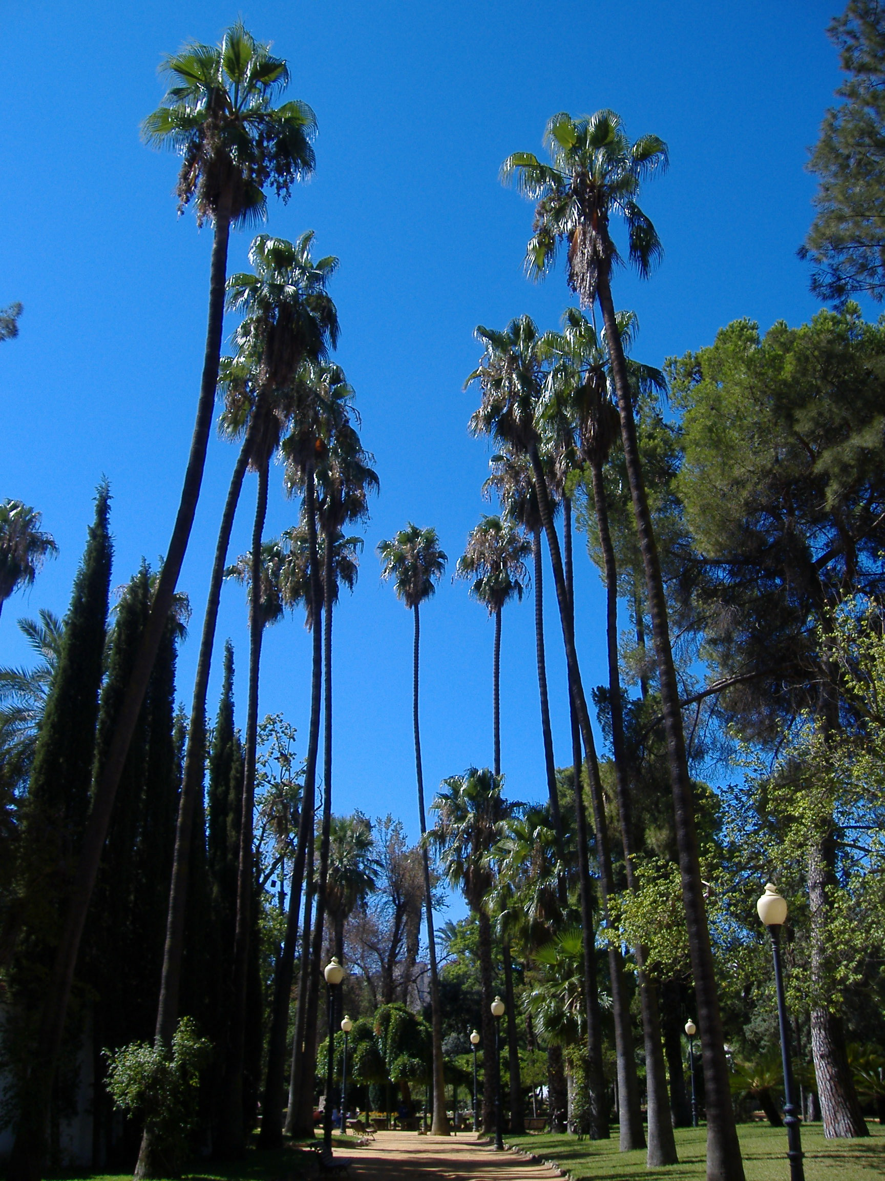 Parque de Castelar.